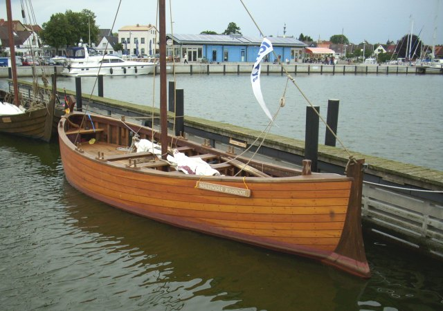 Schleswiger Jesusboot